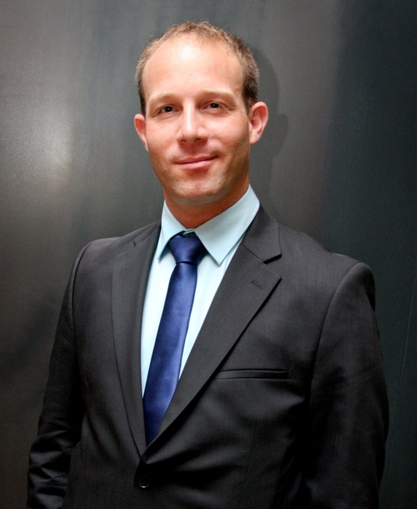 עמיר עקיבא סגל